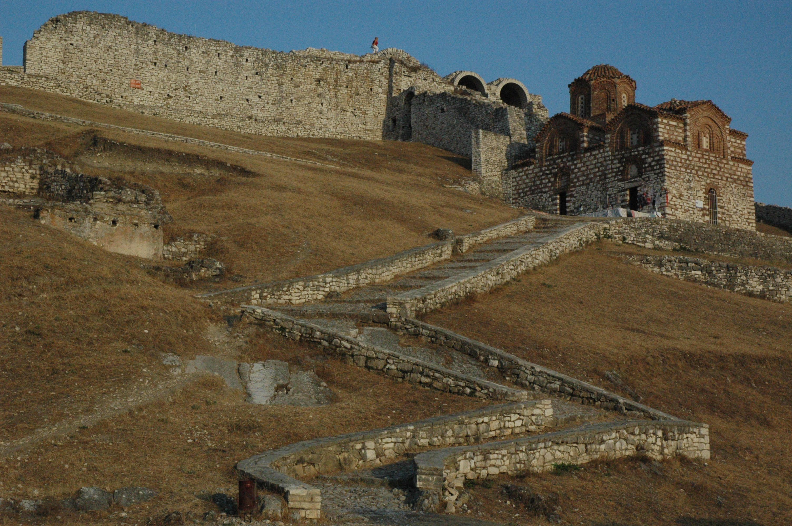 Berat, Albania